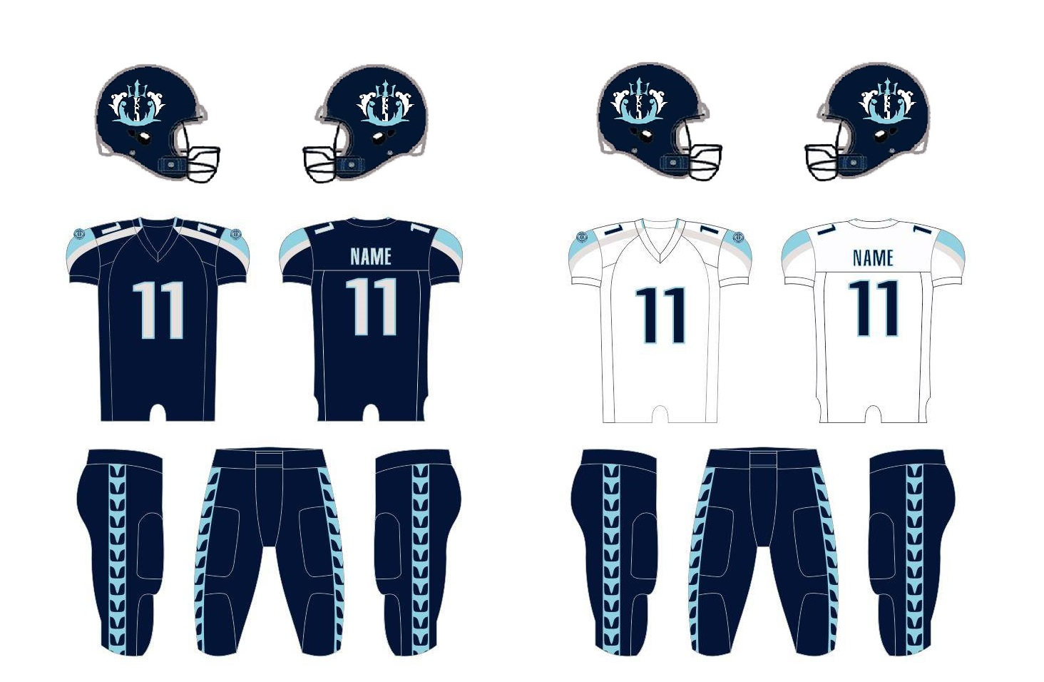 kspfootball主客場球衣